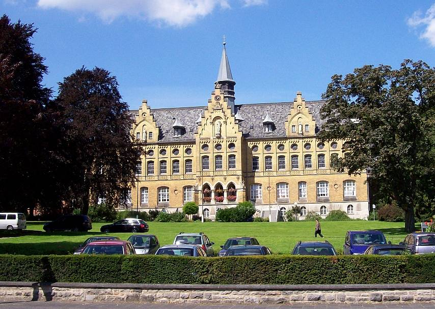 Denkmal geschütztes Hauptgebäude des St.-Johannes-Stiftes in Marsberg (Germany) aus dem Jahren 1884 / 1895